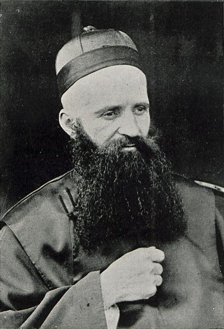 Portrait du Père Louis Gaillard, missionnaire catholique ayant étudié Nankin, Shanghaï et Yantai.